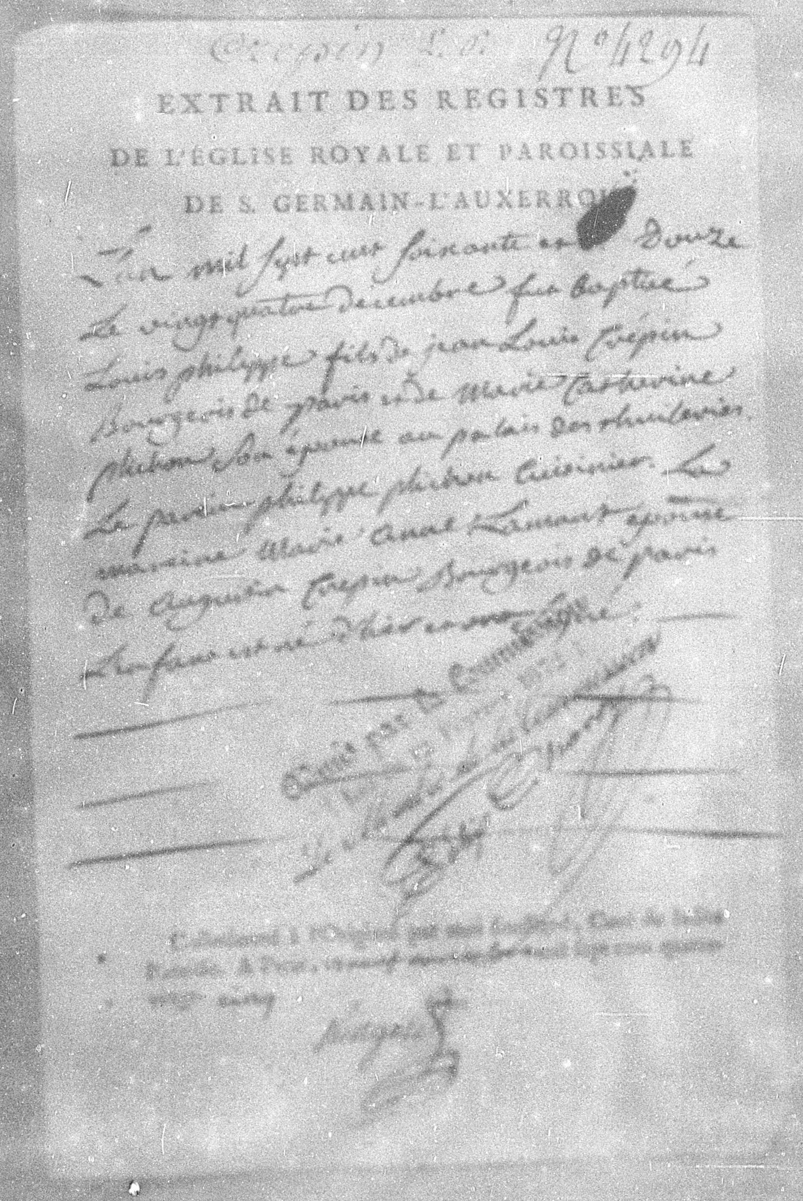 Acte de baptême et de naissance